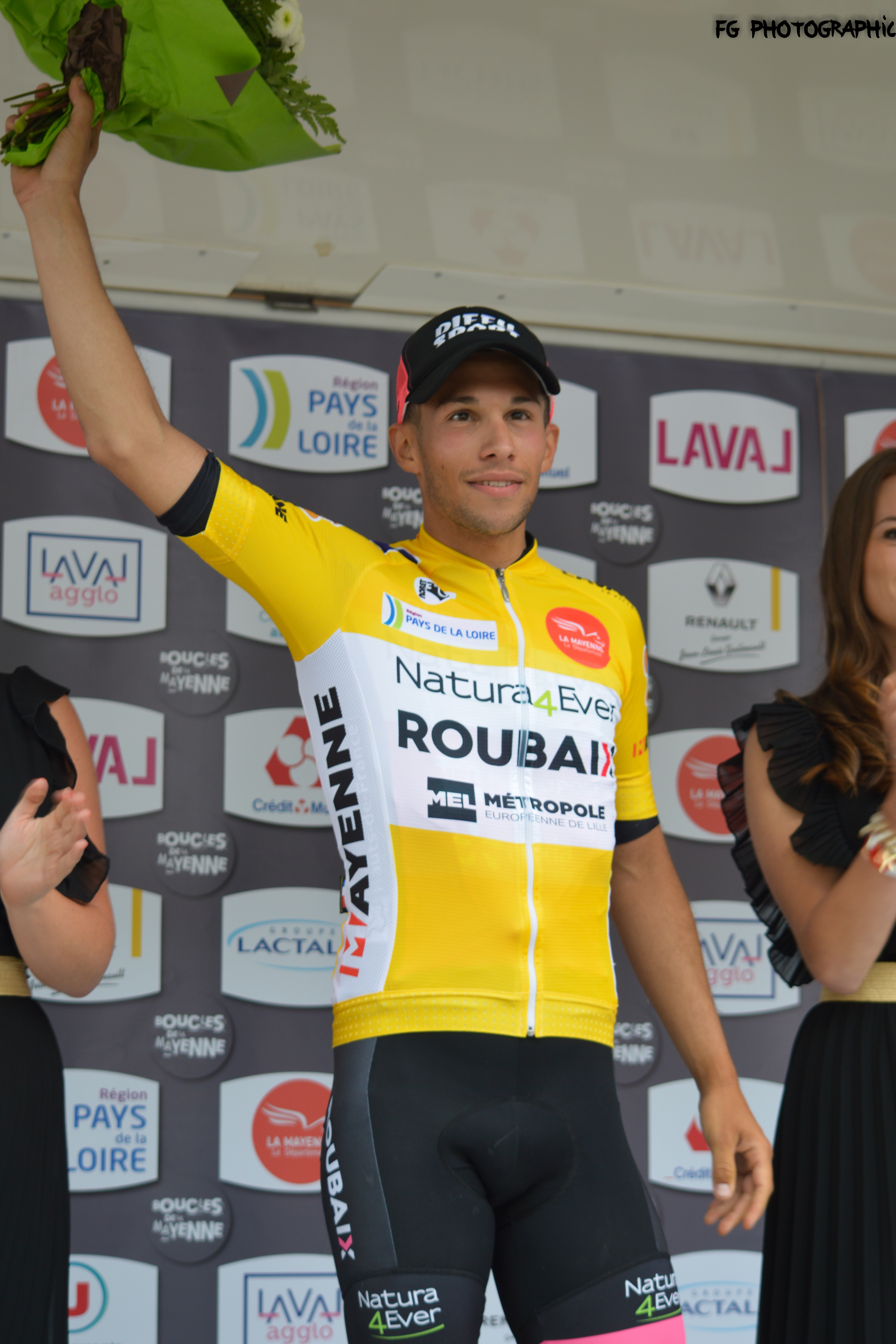 Thibault FERASSE leader des boicles de Mayennes 2019 à l'issue de la 3° étape